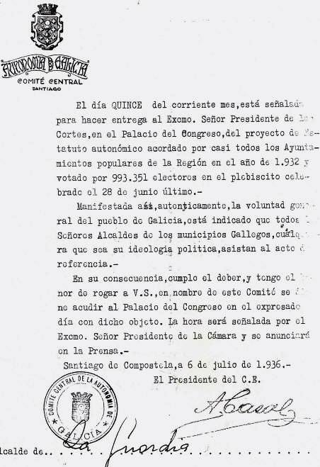 Entrega a Cortes, Estatuto de Galicia de 1936.